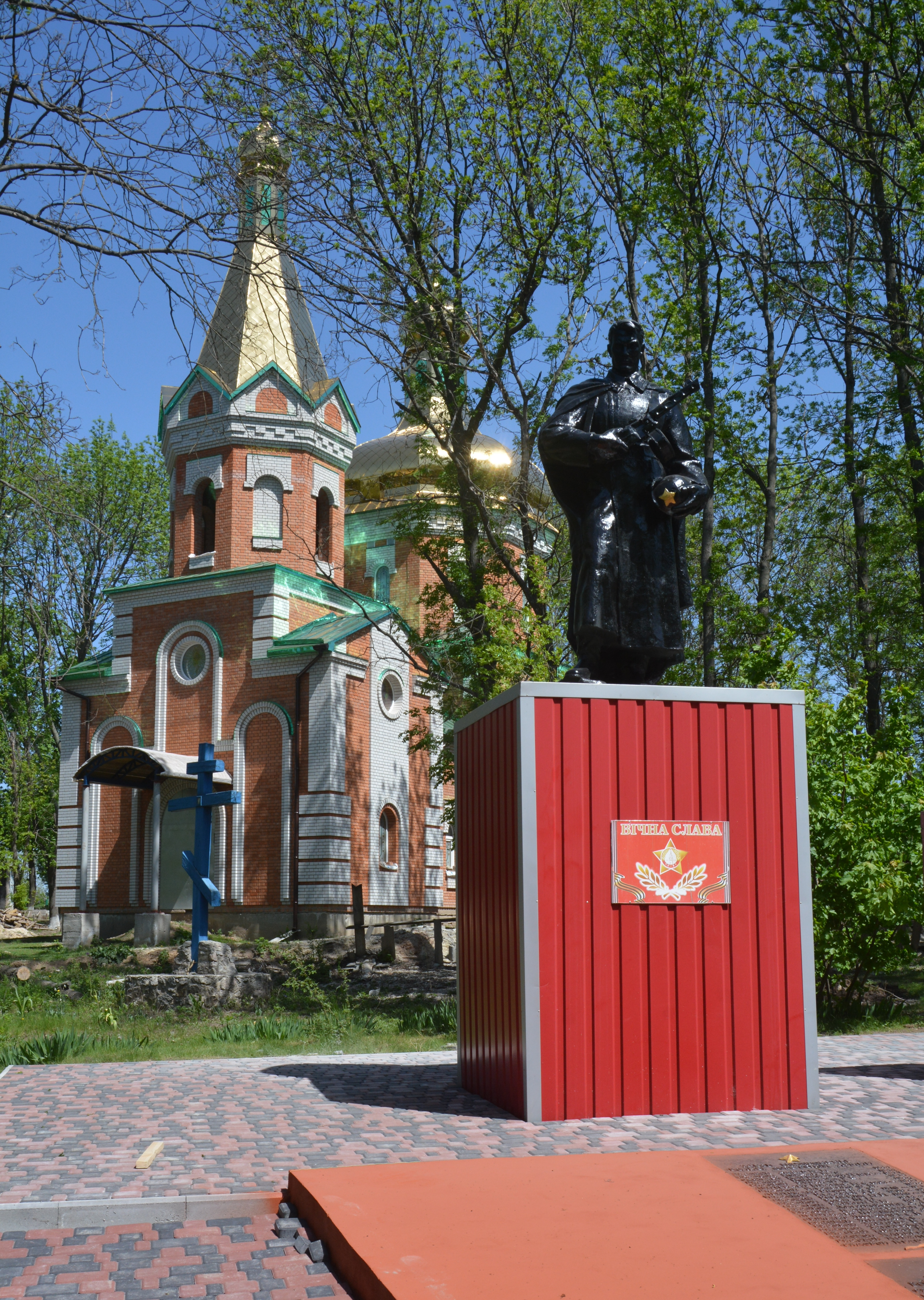 Братська могила Радянських воїнів та пам'ятний знак воїнам землякам. Поховано 51 воїн, Велика Виска, центр